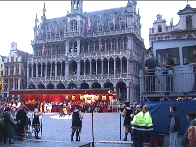 Spectacle de l'Ommegang. Photo prise à la Grand-Place de Bruxelles par Utilisateur:Fistos le 30 juin 2005 vers 22 H